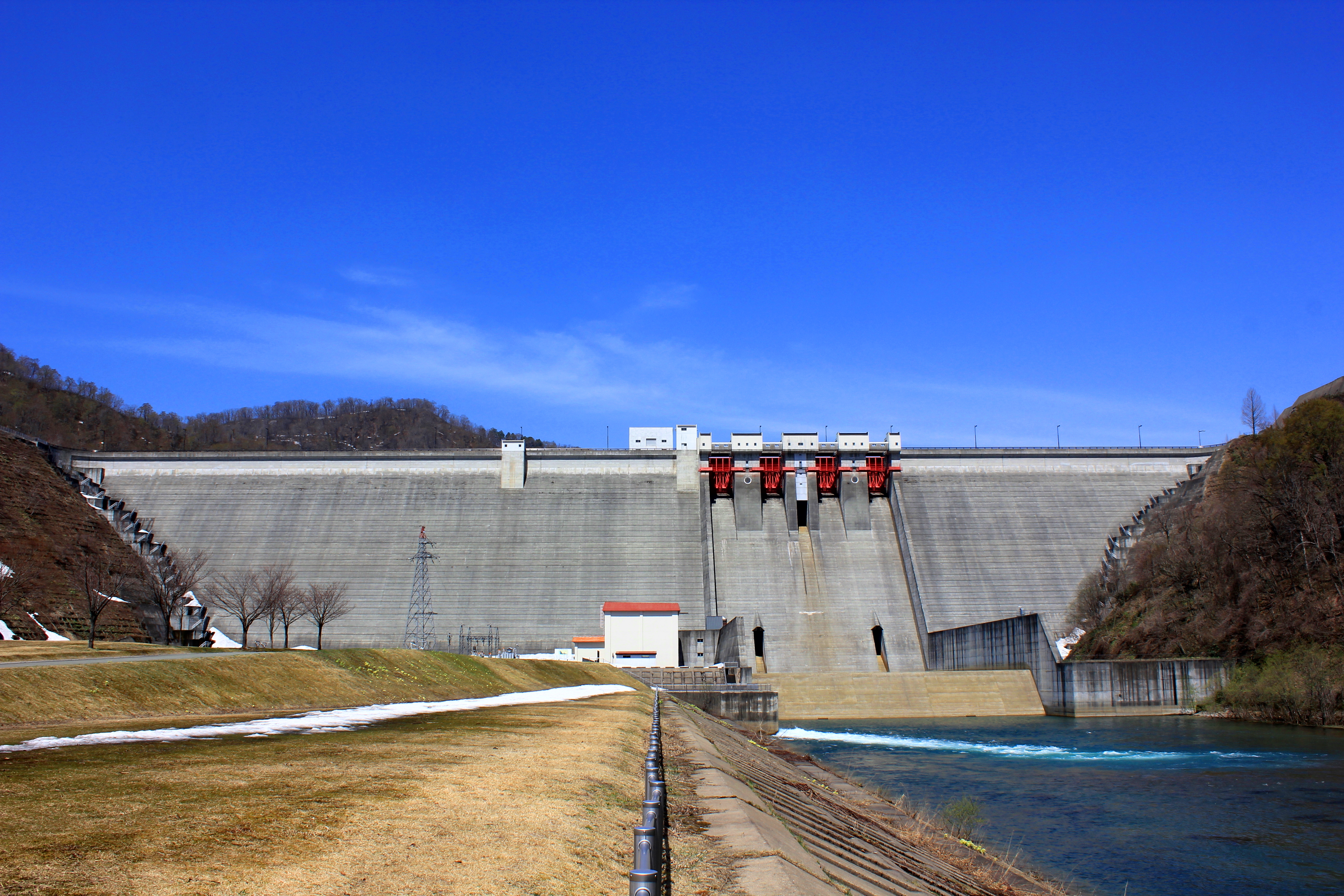 玉川ダム（秋田県・玉川。国土交通省東北地方整備局管理）